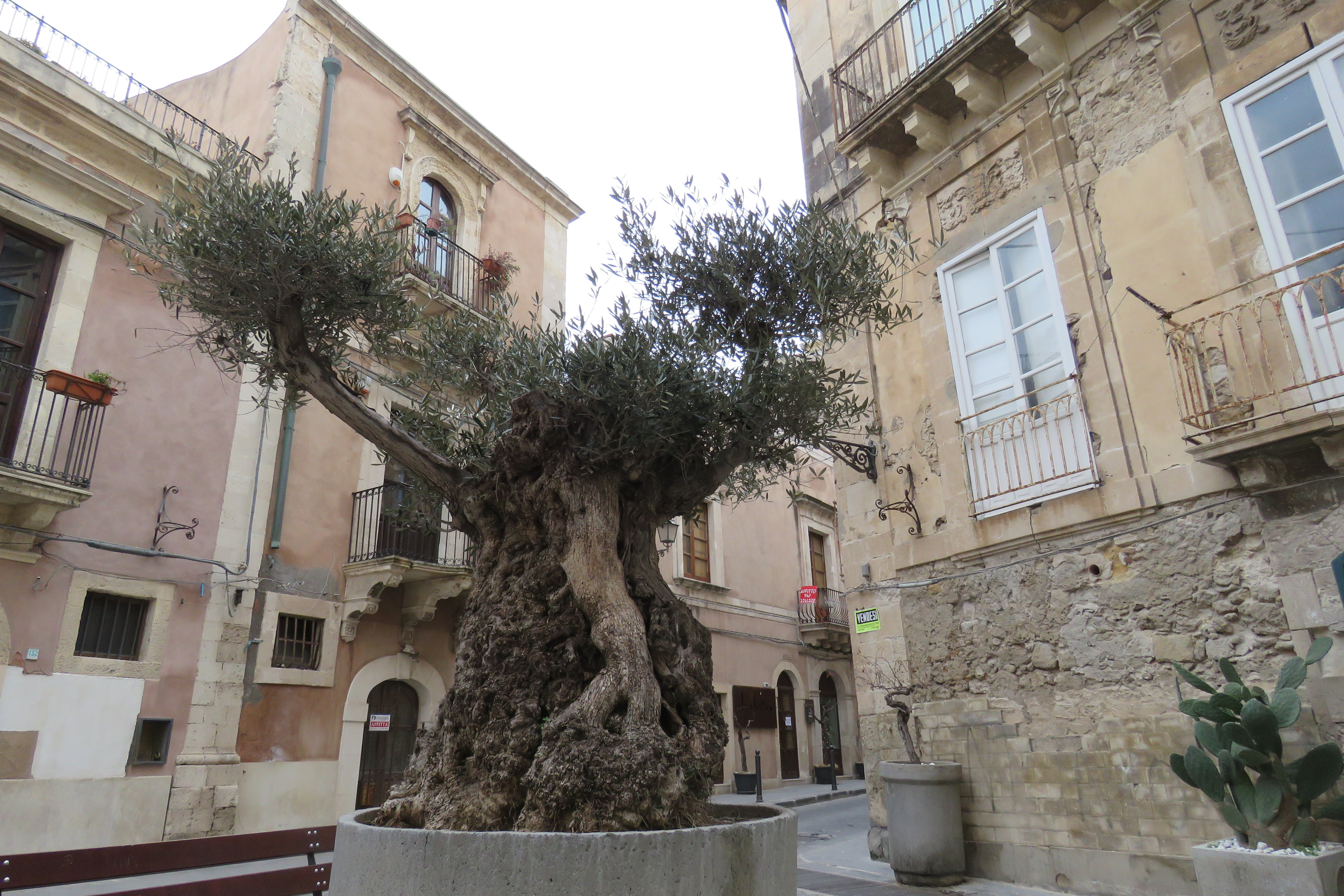 Ulivo, Ortigia